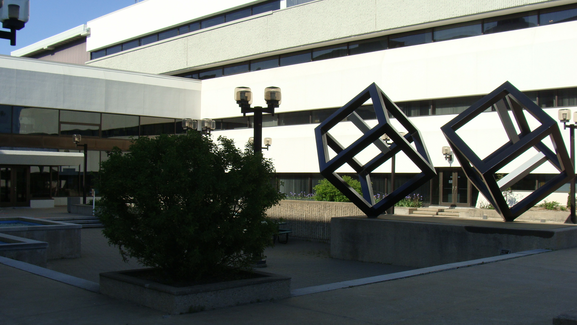 Pavillon Ringuet de l'Université du Québec à Trois-Rivières, au Québec (Canada).